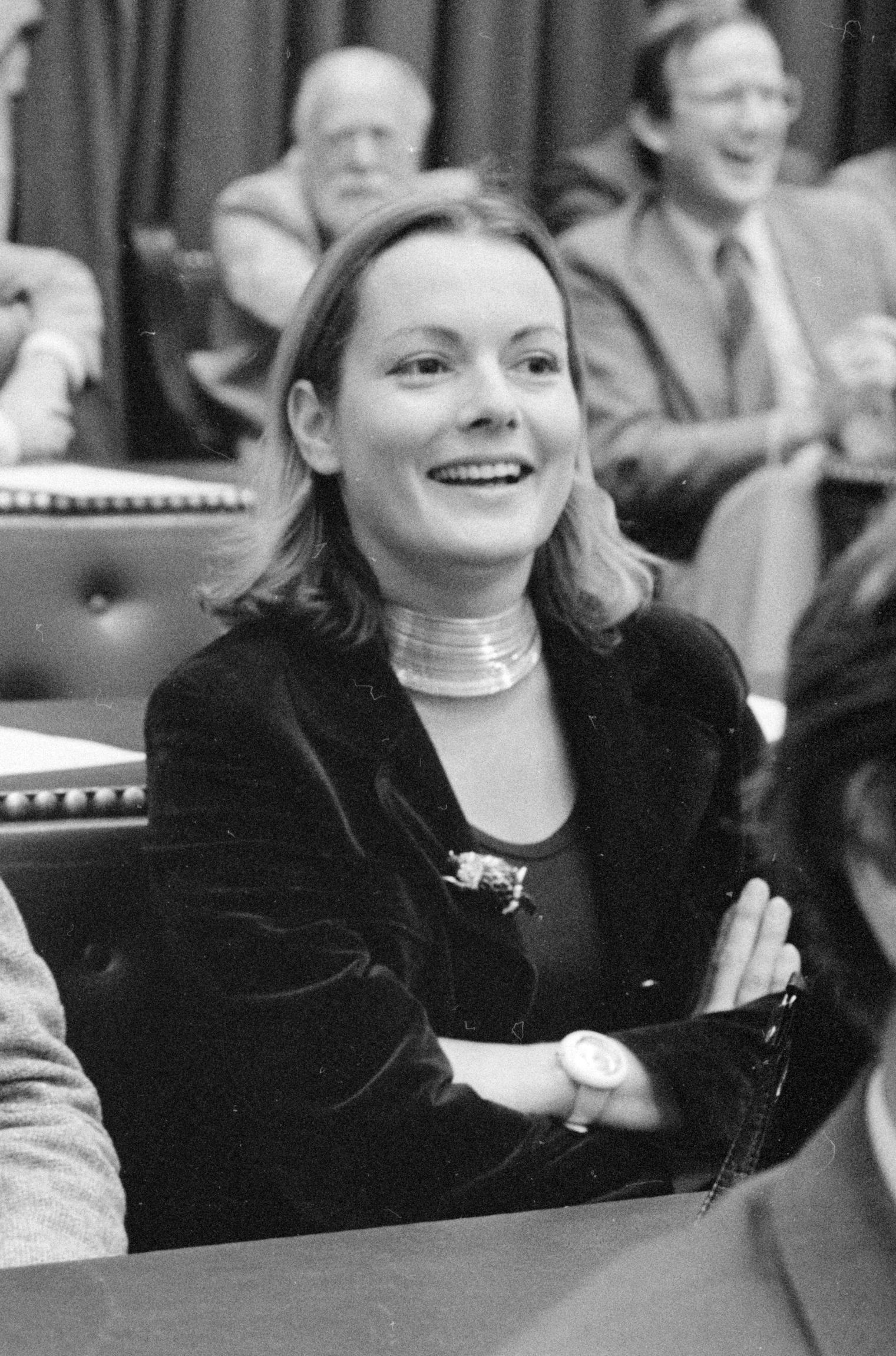 Suzanne Bisschoff van Heemskerck